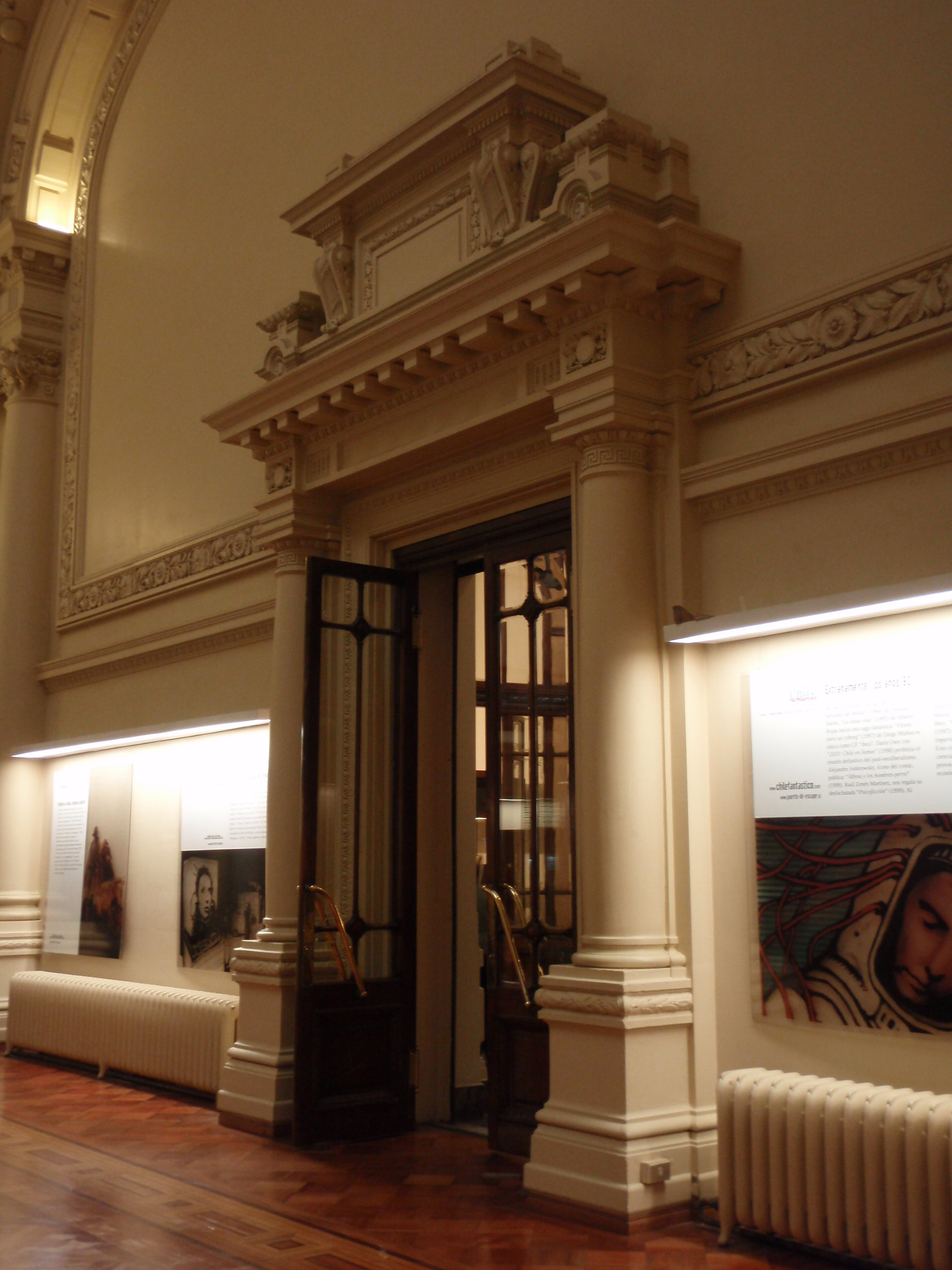 Biblioteca Nacional de Chile This is a photo of a national monument in Chile: 102